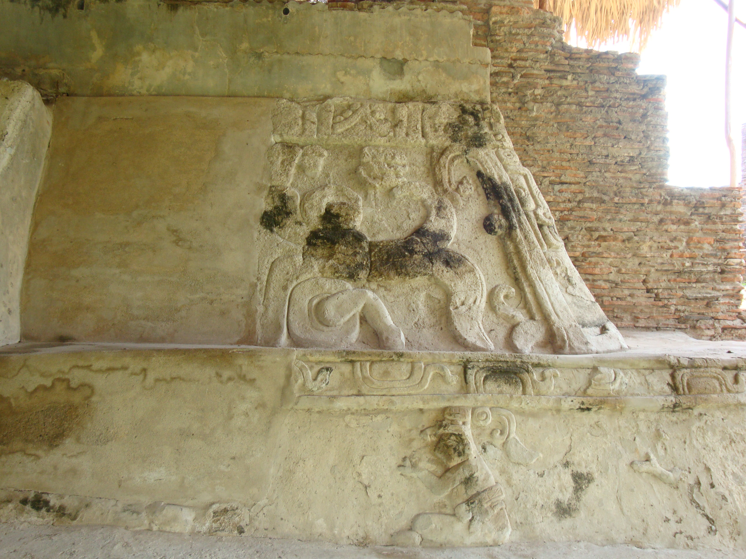 Relieve en estuco, en el Templo VII o también llamado "Templo de las Figuras Sedentes", en la ciudad maya de Comalcalco, Tabasco, México.